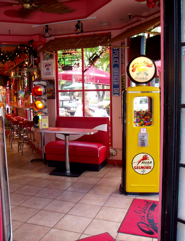 diner